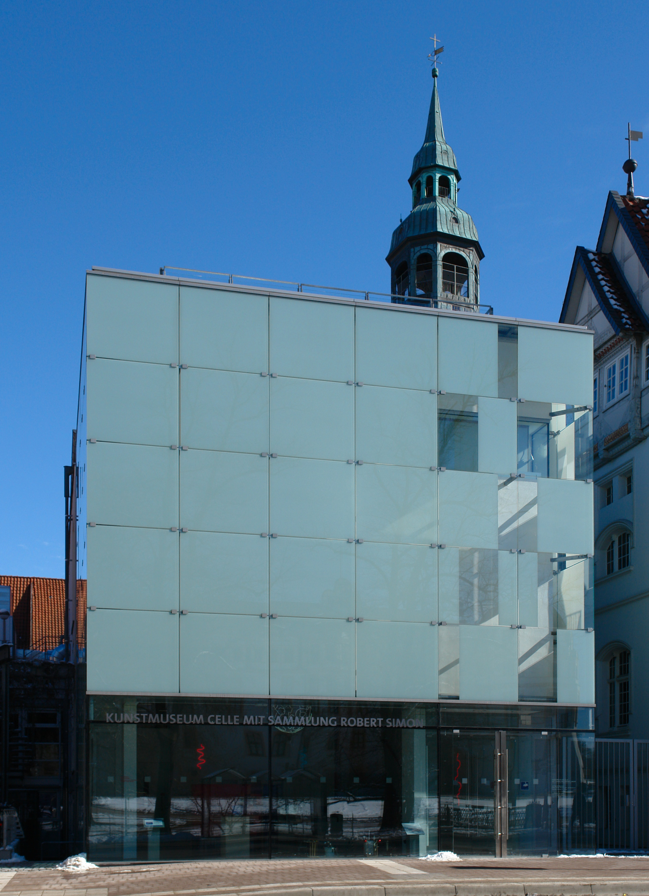 Kunstmuseum Celle, Germany.